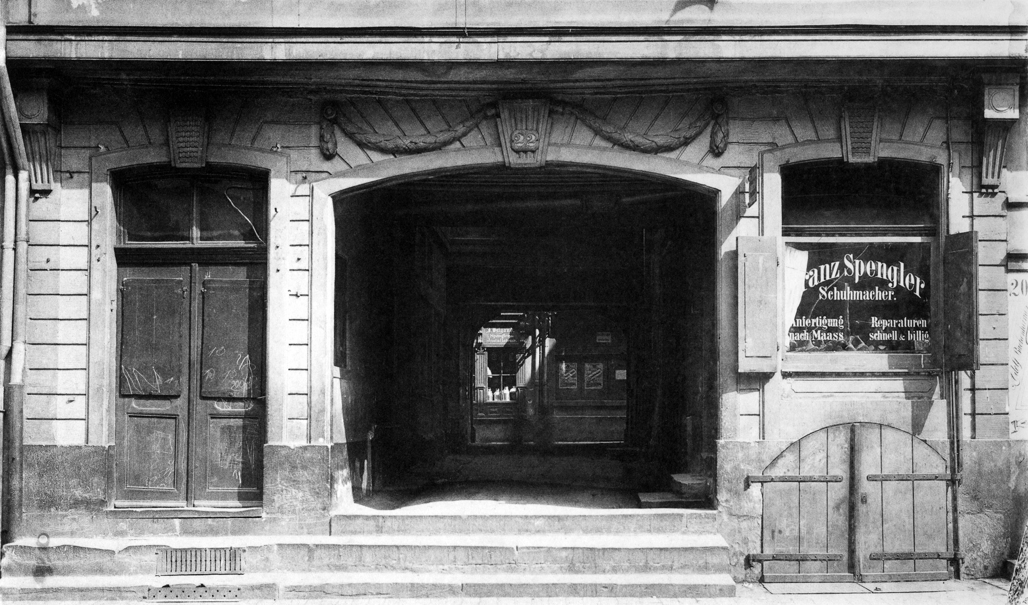 Detail des im Stil Louis-Seize gestalteten Erdgeschosses des Scharnhauses Saalgasse 22 in der Altstadt von Frankfurt am Main.